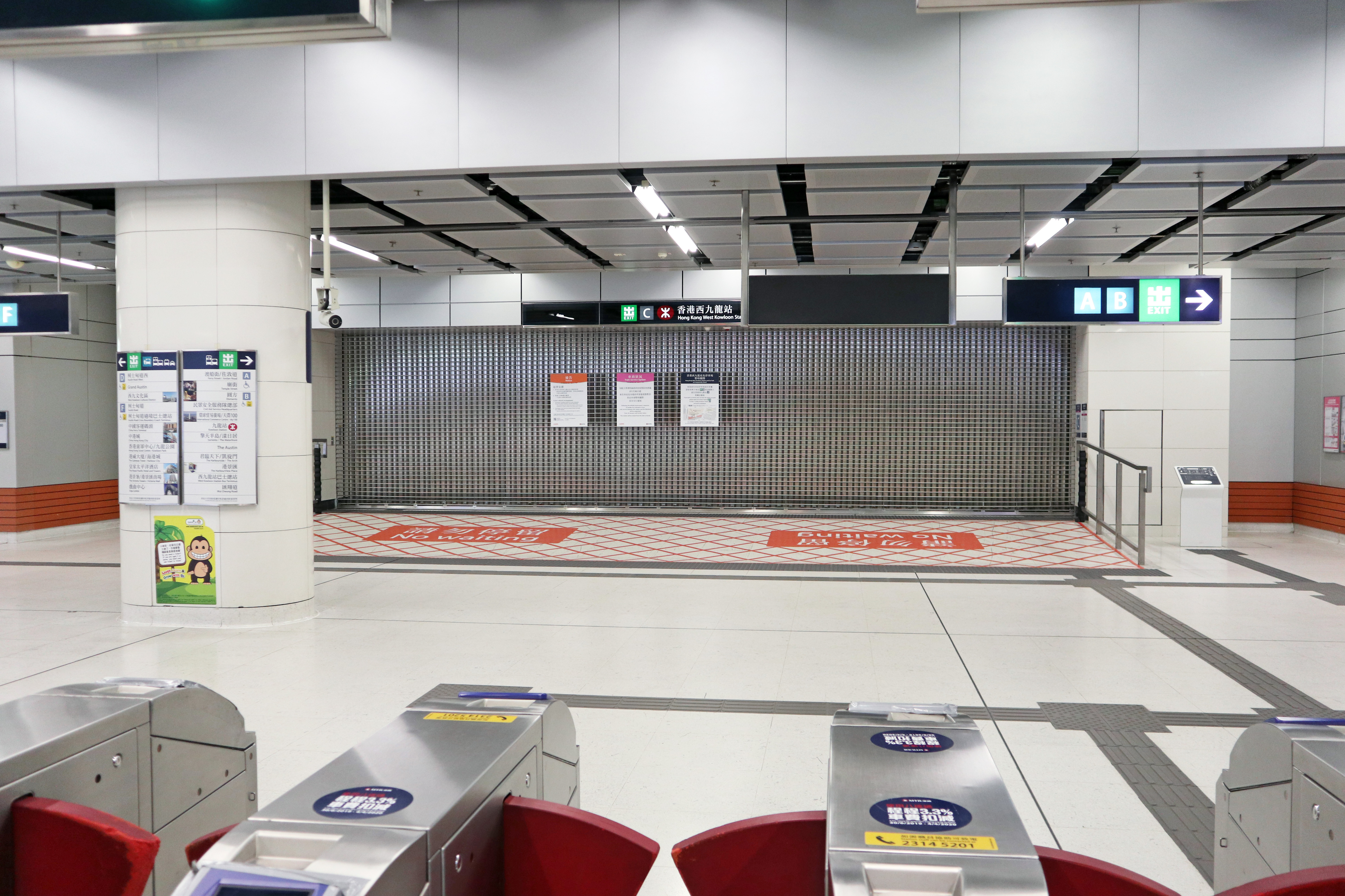 港鐵柯士甸站C出入口，因武漢新型肺炎影響，高鐵西九龍站暫停開放，該出口亦暫時關閉。